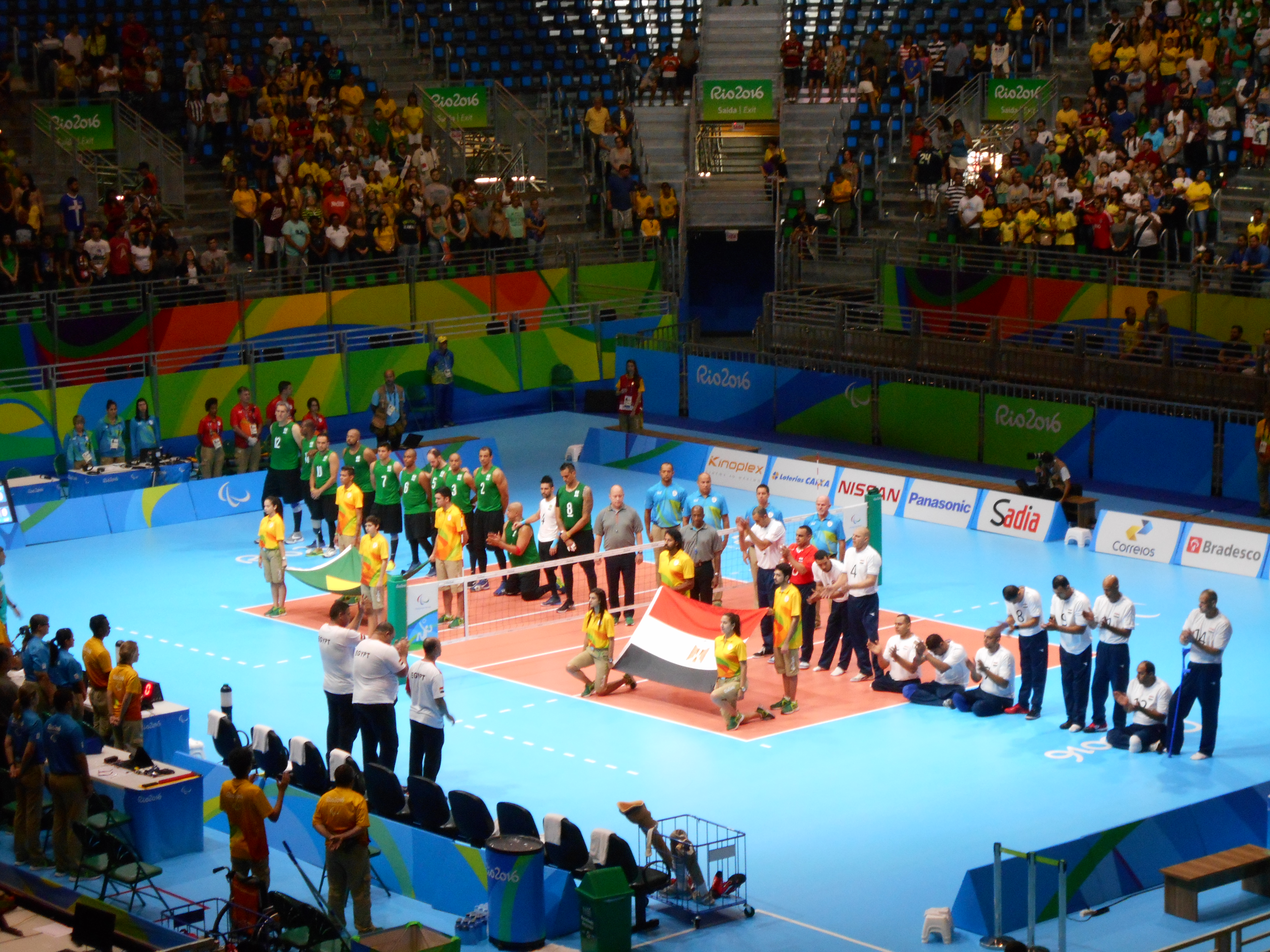 Jogo de voleibol sentado entre as seleções do Egito e do Brasil.